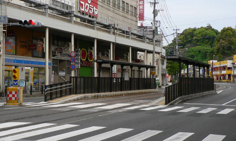 長崎電気軌道、住吉電停